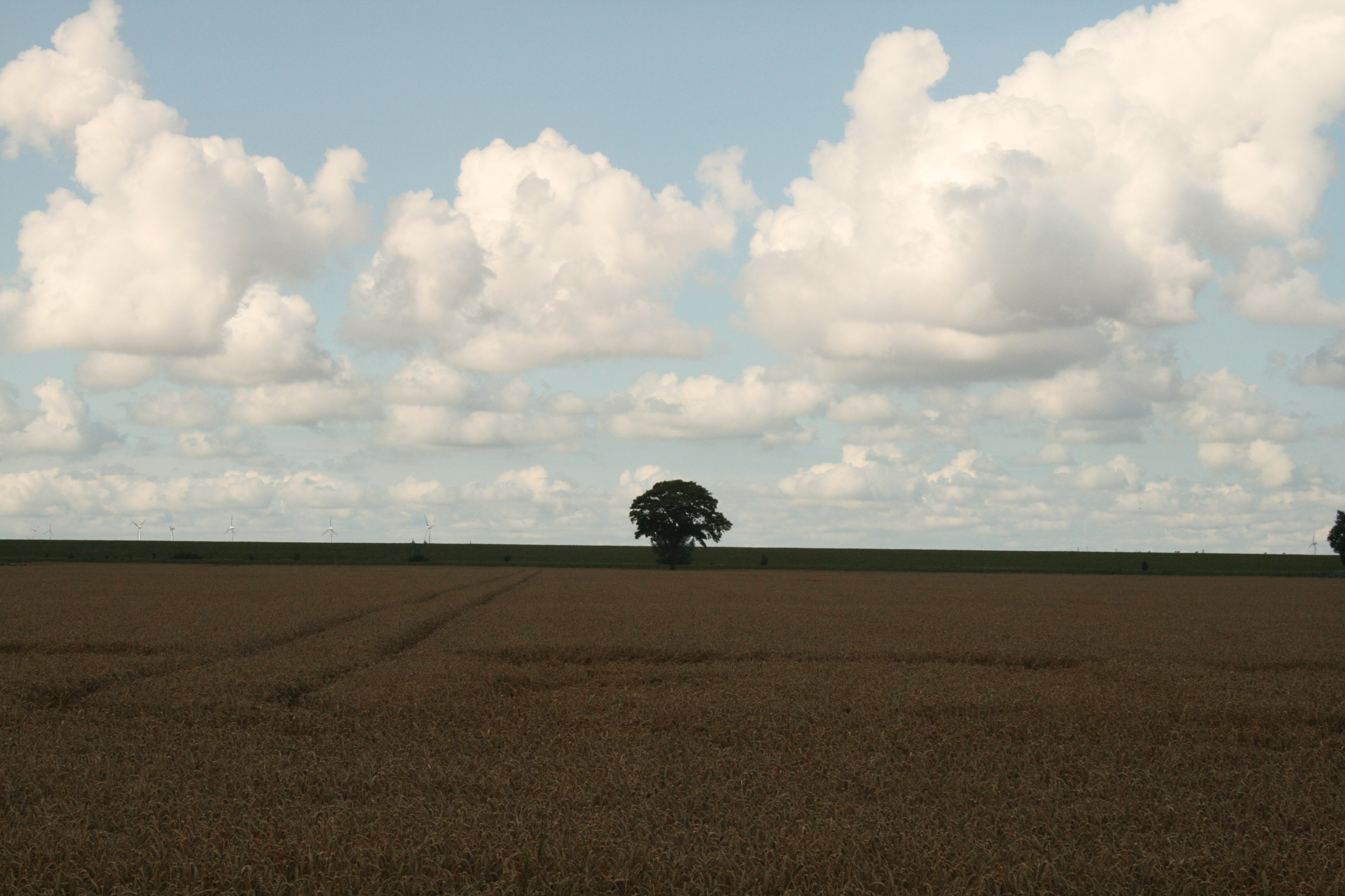 Reiderwolder polder 6 Richting de Dollard (2010)